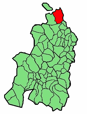 Akamarre udalerriaren kokapena Nafarroa Beherean